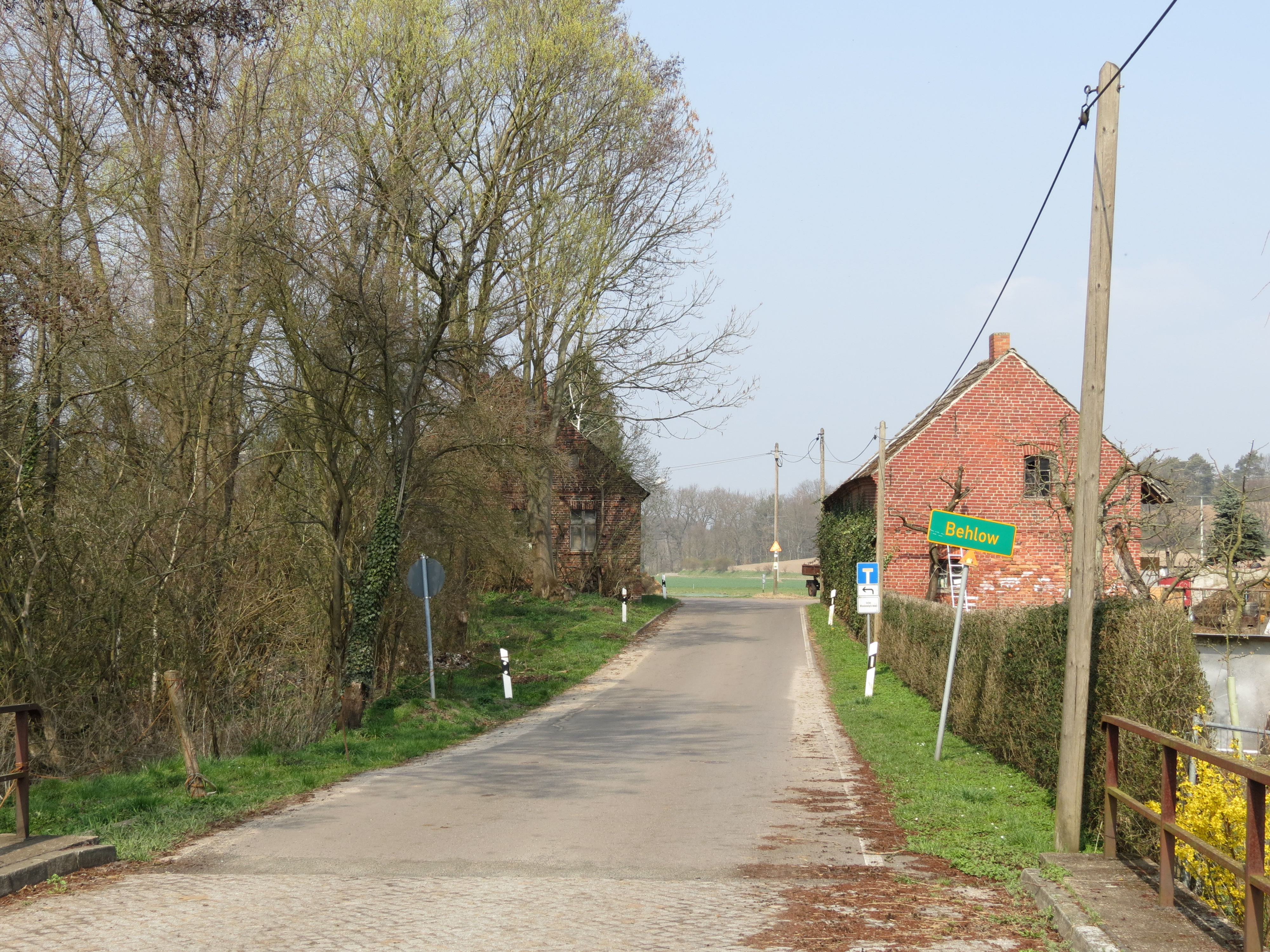 Behlow, Gemeindeteil der Stadt Lieberose, Lkr. Dahme-Spreewald, Brandenburg, Deutschland, Ortseingangschild an der Brücke über das Lieberoser Mühlenfließ